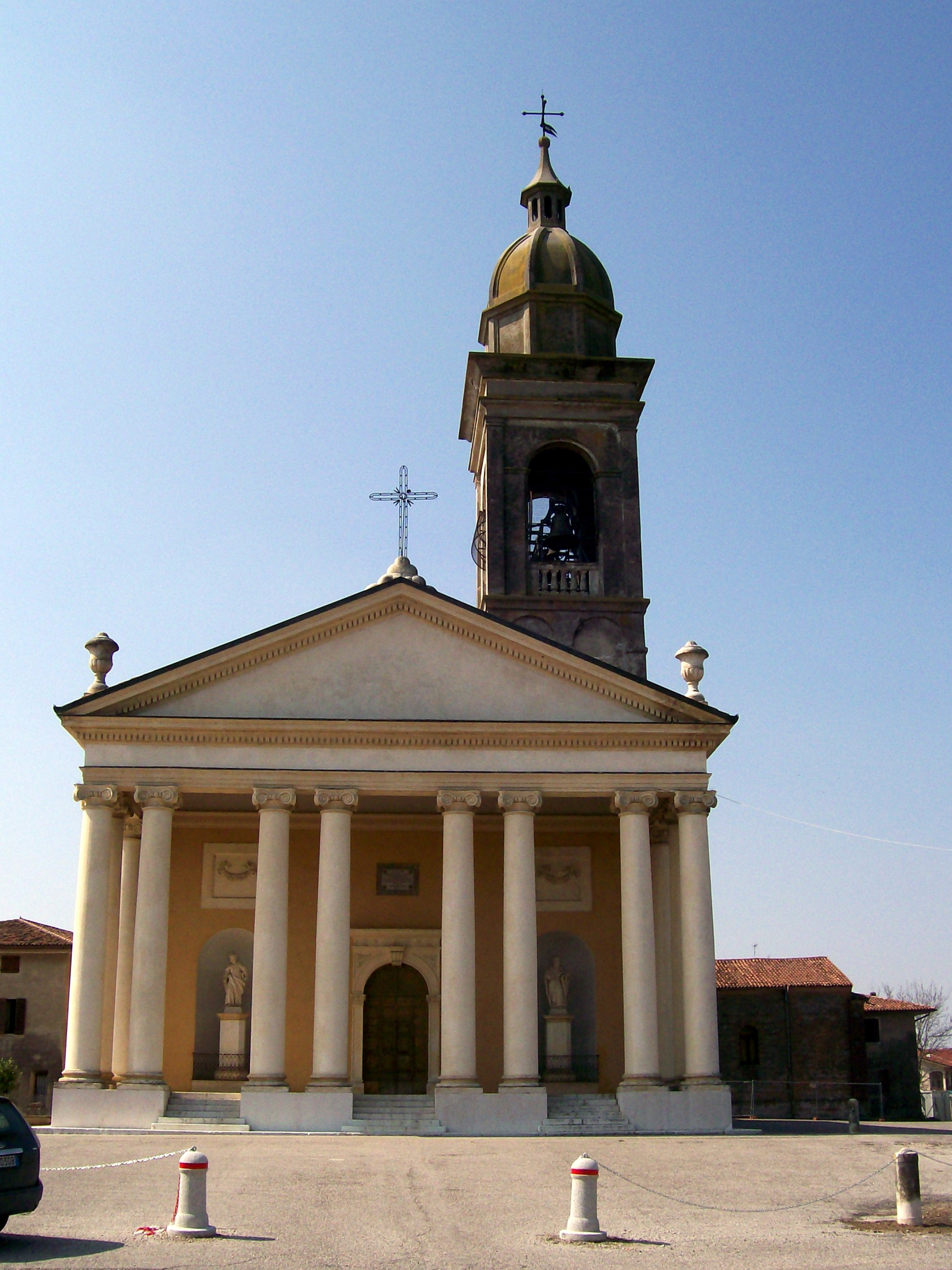 Facciata della chiesa parrocchiale dei Santi Pietro e Paolo Apostoli in Isola Rizza (VR).